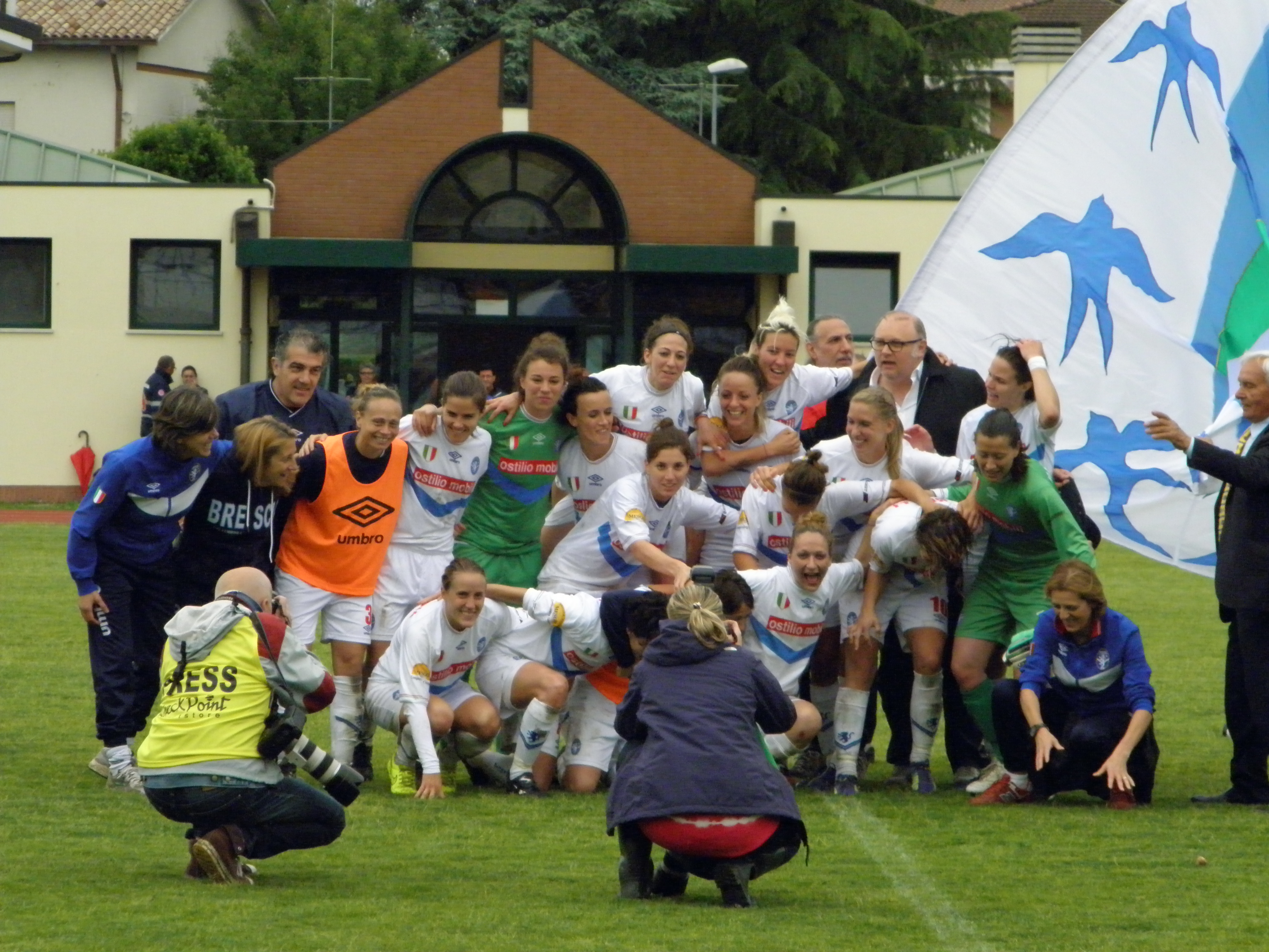 Abano Terme, 23 maggio 2015, finale di Coppa Italia di calcio femminile 2014-2015: ACF Brescia Femminile contro UPC Tavagnacco 4-0. Il Brescia festeggia la conquista della sua seconda Coppa Italia.